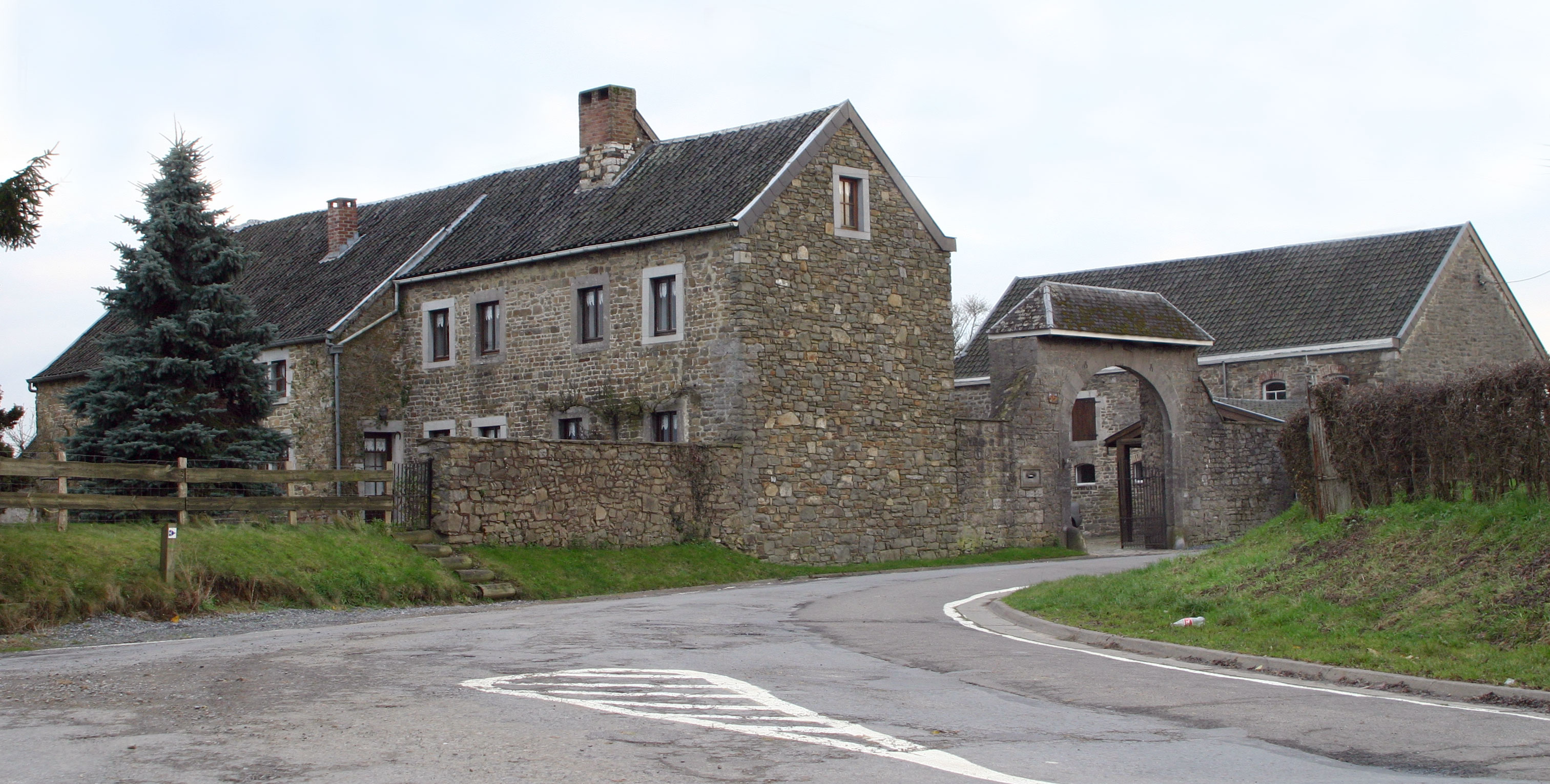 Ferme carrée zu Hansez. Hansez